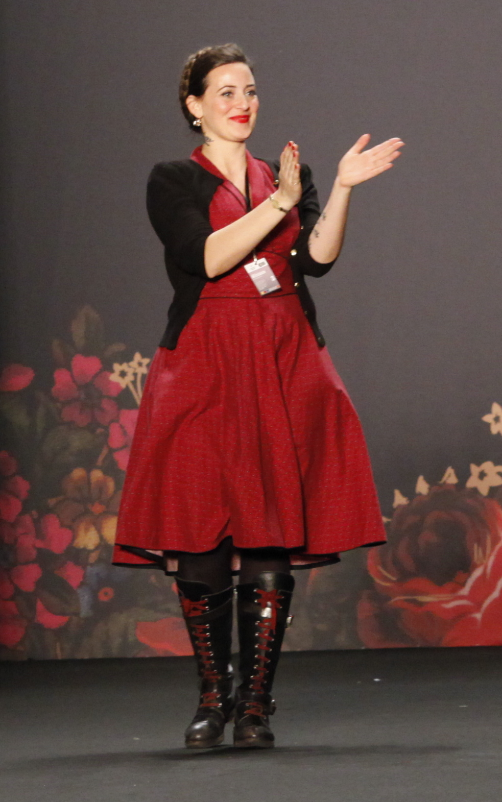 Herbst/Winter